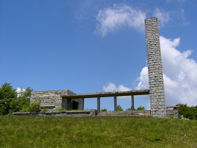 Památník v Bajincích